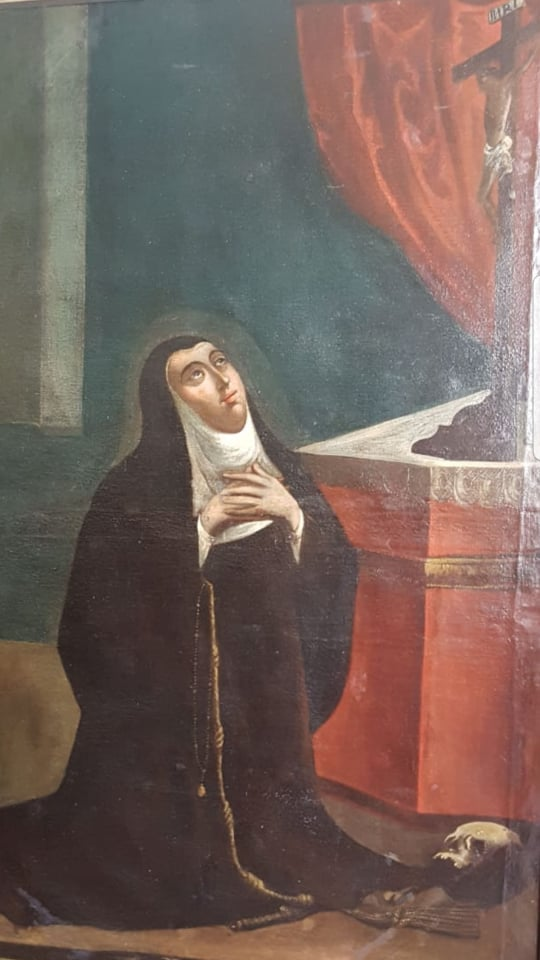 Quadro em tamanho natural representando a Madre Vitória da Encarnação em oração. Encontra-se na cela em que a Madre faleceu, no Convento de Santa Clara do Desterro da Bahia